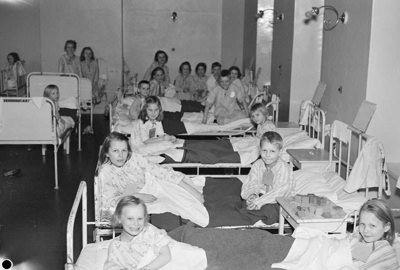 Maria Sjukhus. Sovsal för finska krigsbarn, två och två i varje säng. Södra barnbördshuset, Wollmar Yxkullsgatan 27, Stockholm (Kvarteret GRIMMAN, Södermalm). Beteckning: Fotonummer SvD 33937.